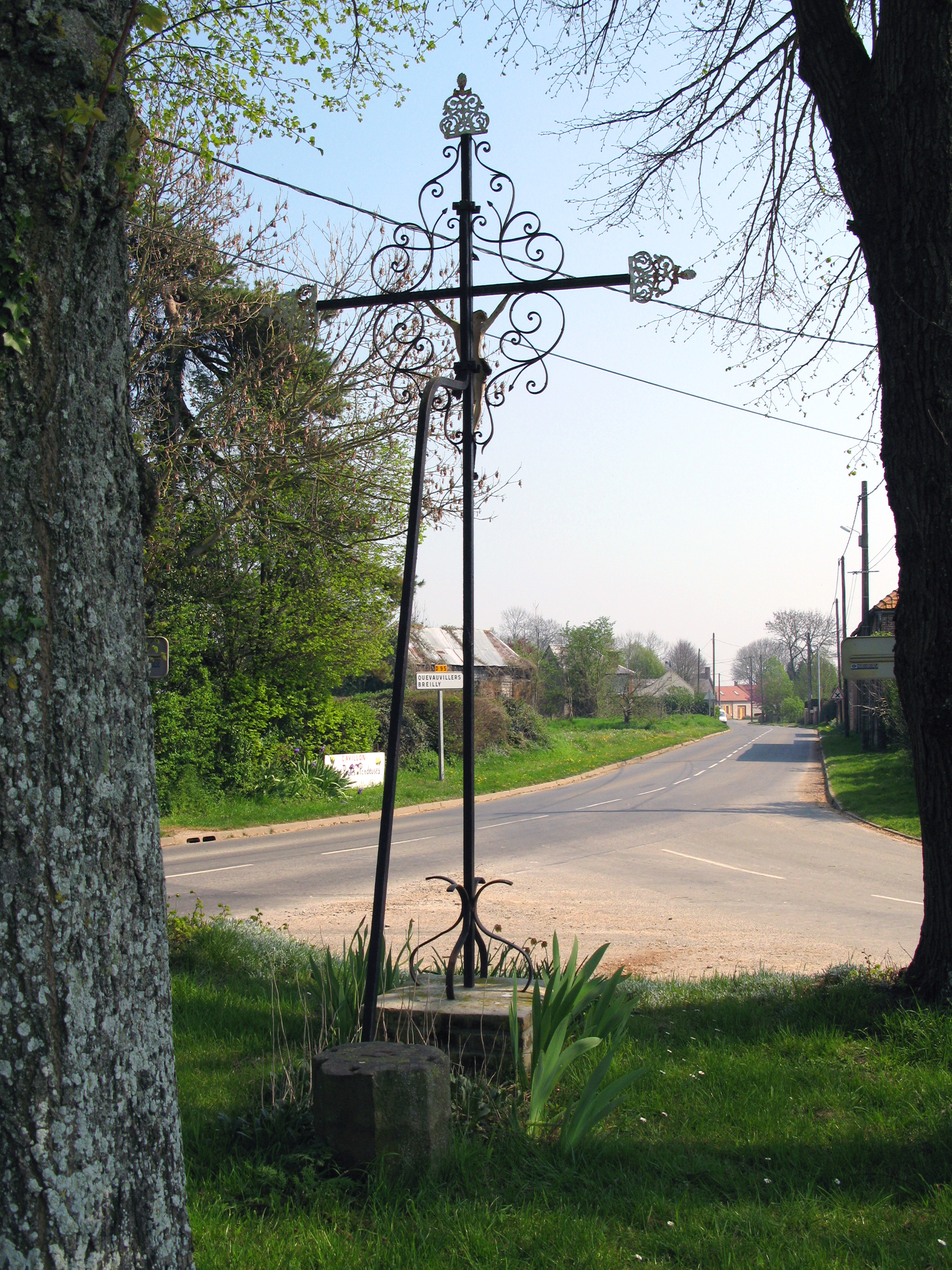 Cavillon (Somme, France)